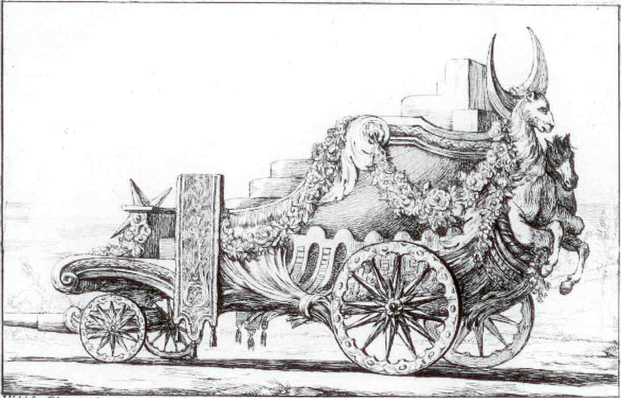 Char tiré par quatre chevaux de front sur lequel etoient les Sultanes et les Eunuques.